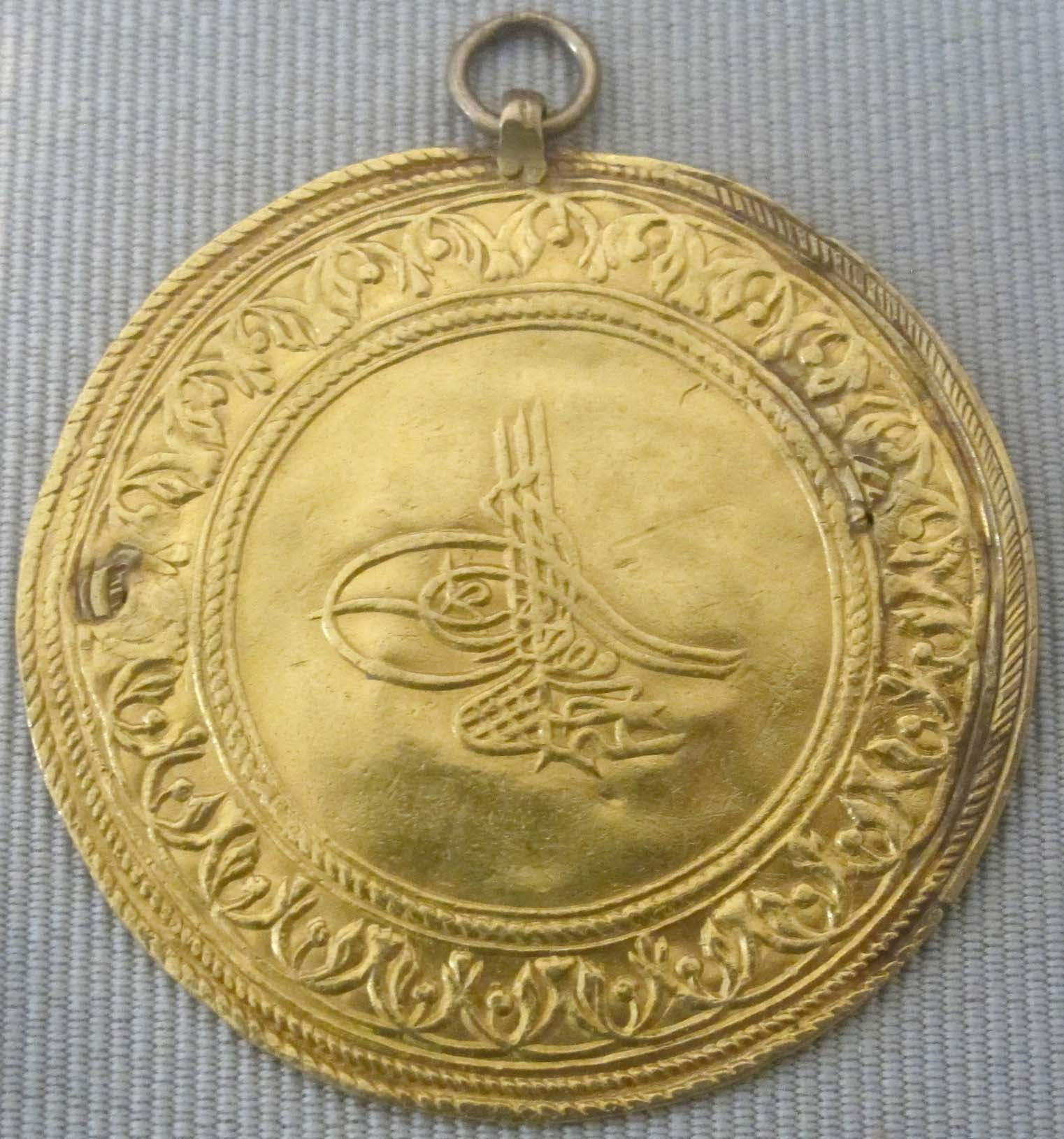 Turchia, osman III, moneta d'oro, 1754-1757